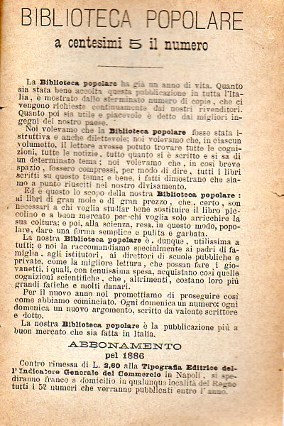 1886 Biblioteca Popolare E.Pietrocola dopo un anno pagina interna (collezione privata G.P.)